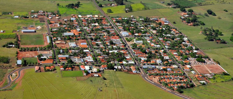 Nova Canaã Paulista / Interior do Estado São Paulo